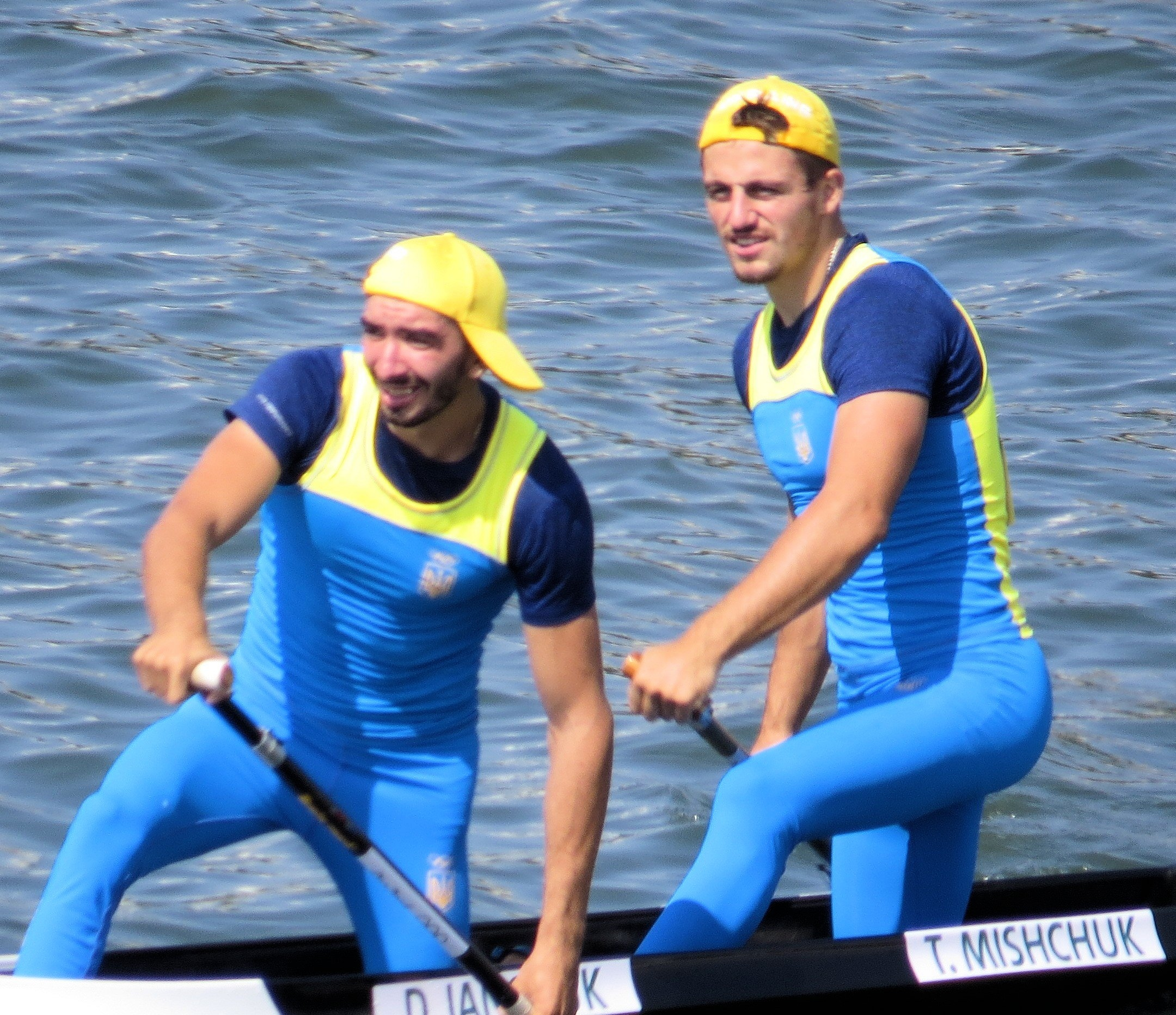 Sx50